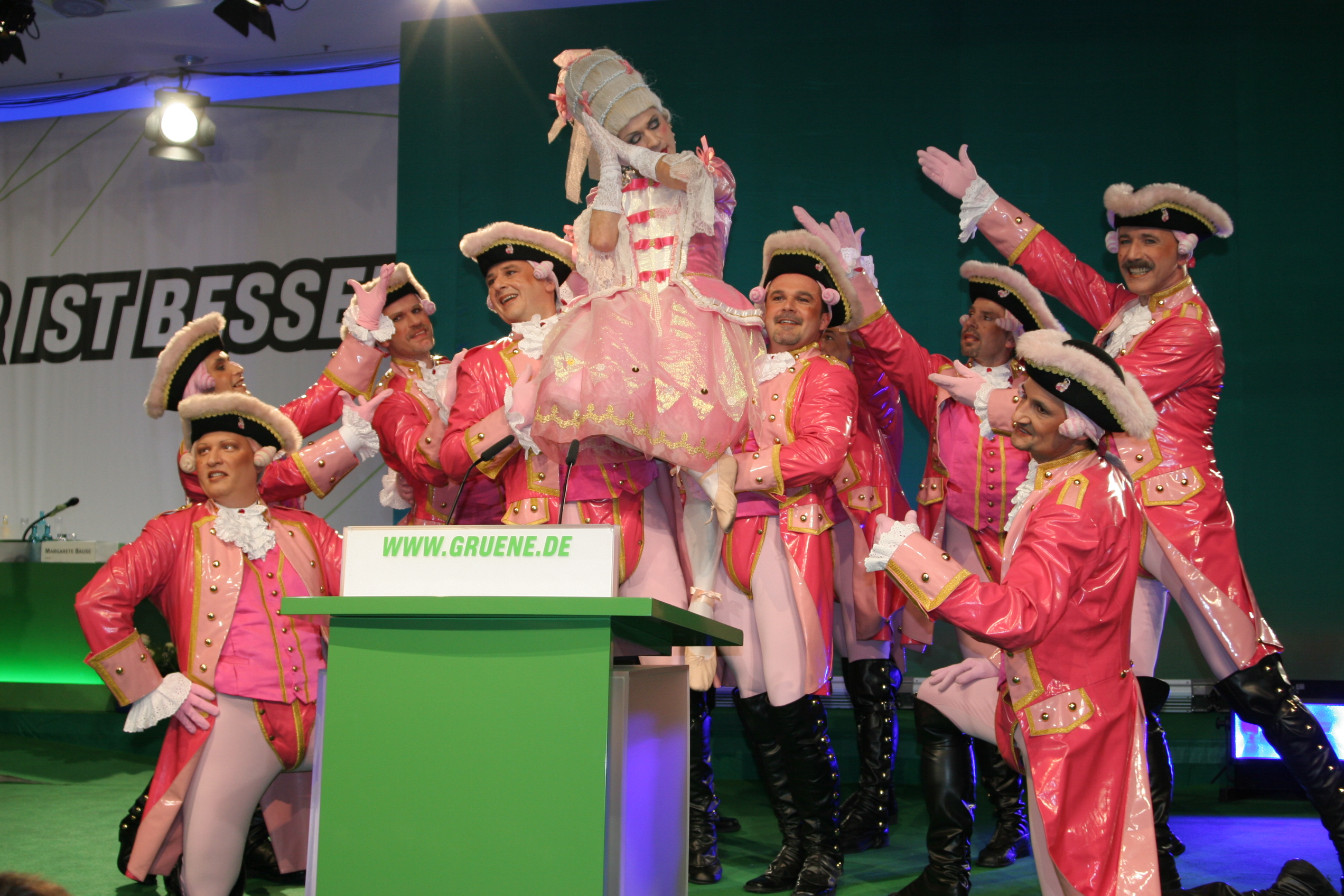 Auftritt der Rosa Funken auf dem Bundesparteitag der Grünen Anfang Dezember 2006 in Köln